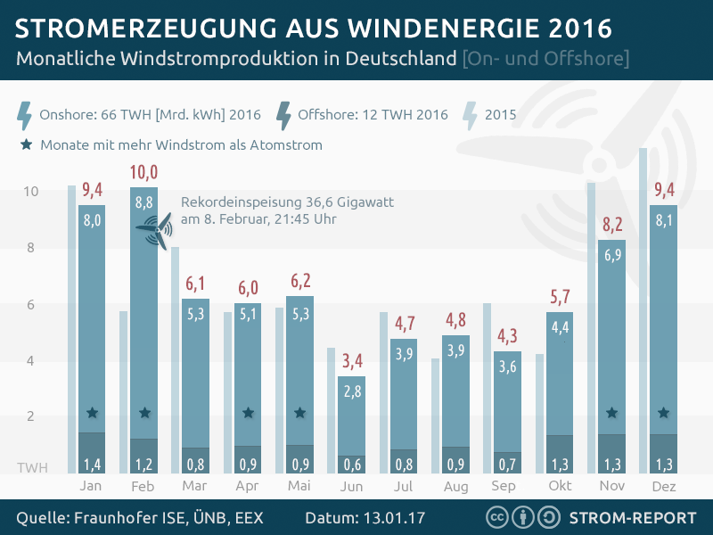 Windstromerzeugung Deutschland 2015 (Stand 4. Januar 2016)